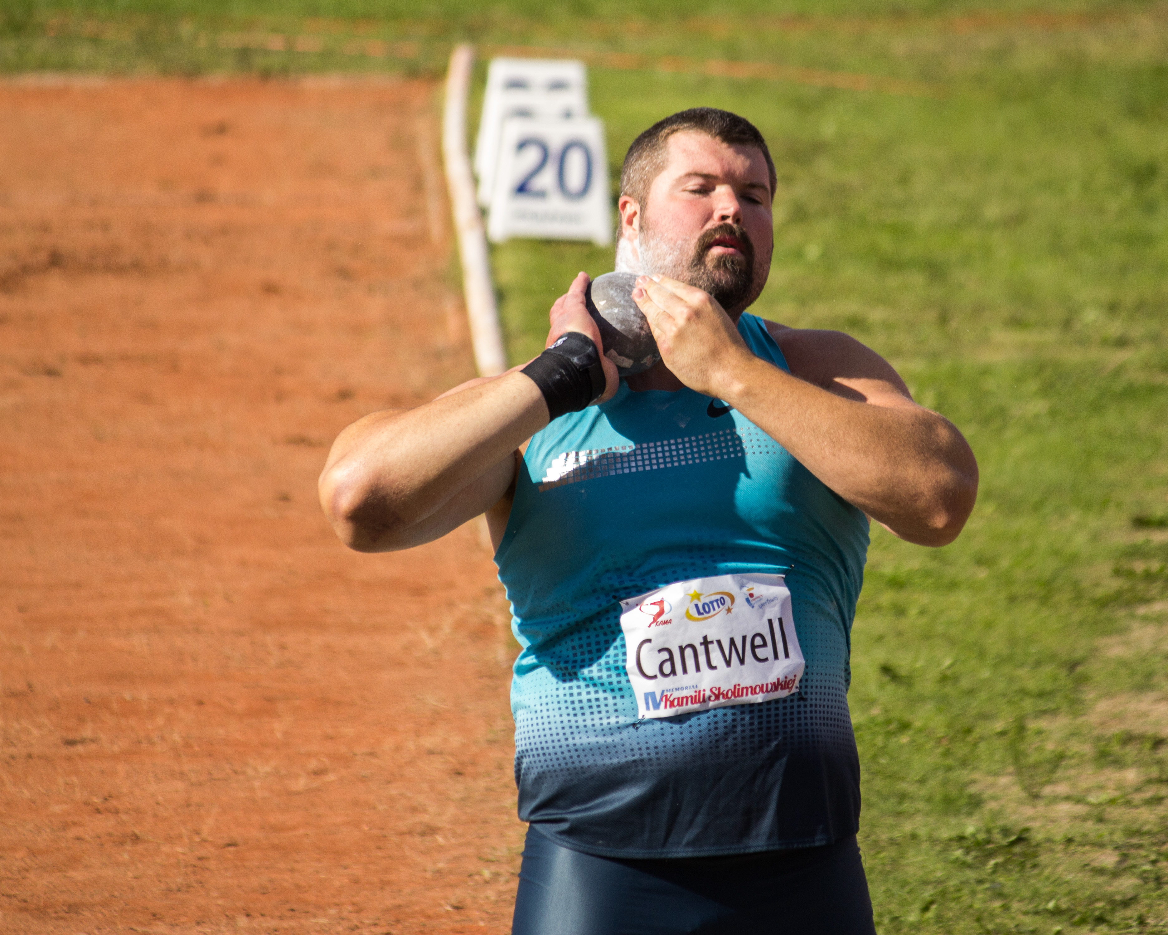 Memoriał Kamili Skolimowskiej w Warszawie, 2013-08-25